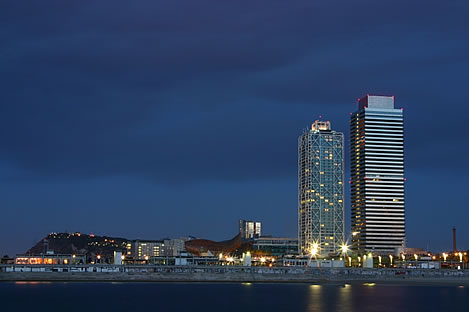 Visión nocturana de las Torres Mapfre en el Port Olimpic